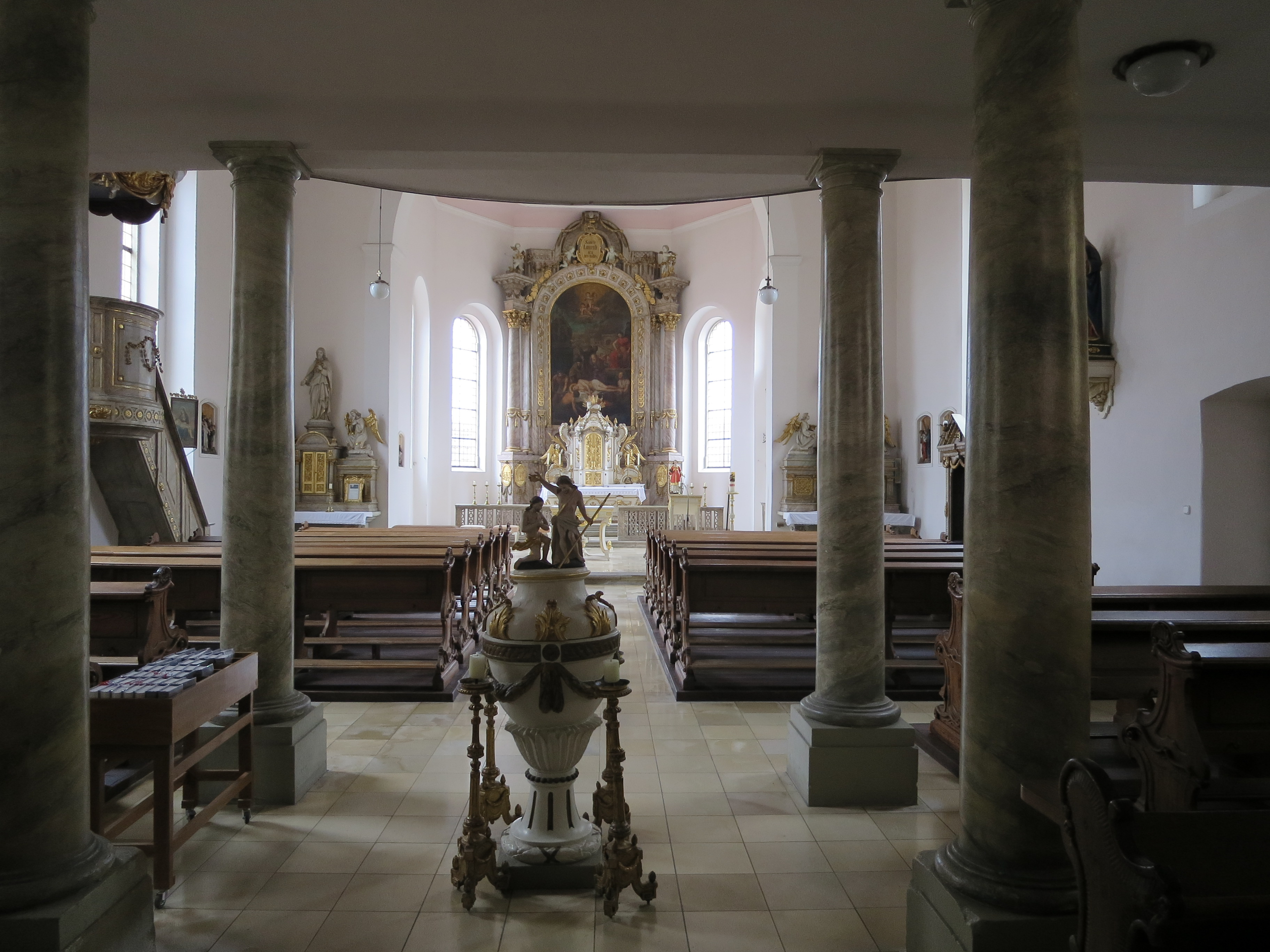 Die spätbarocke Dorfkirche des Stadtteils Würzburg-Lengfeld